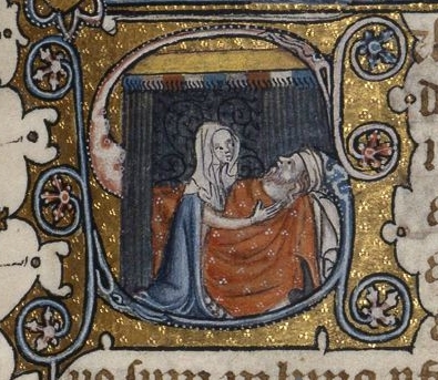 Fitzwilliam Museum Cambridge, MS 38-1950, f. 78 detail: Abigail tends Nabal